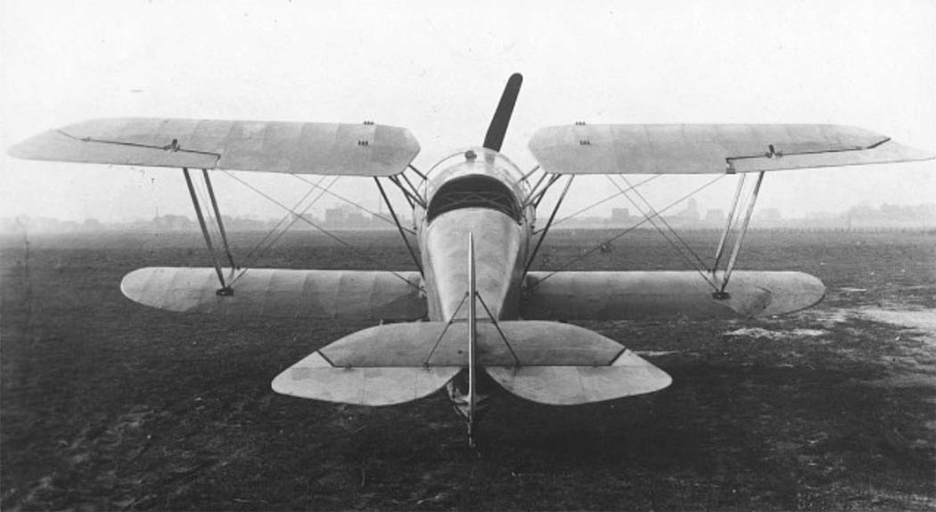 Prototyp niemieckiego samolotu myśliwskiego Kondor D 6.